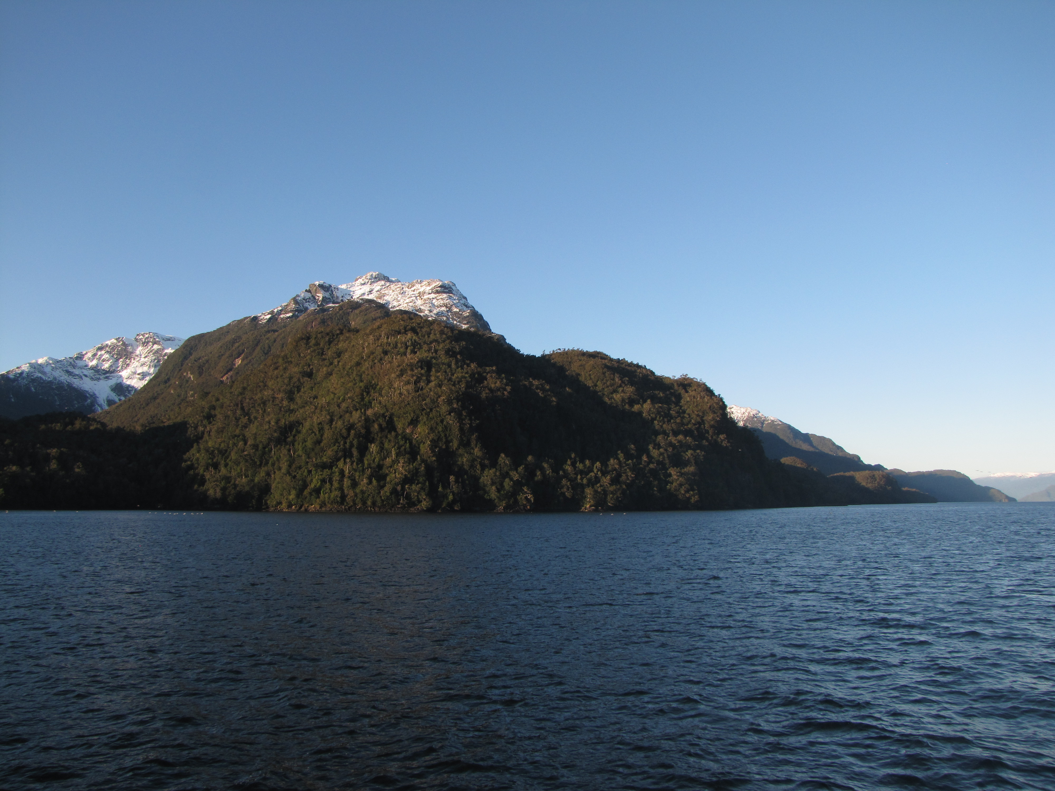 Isla Magdalena, Parque nacional Isla Magdalena, Chile